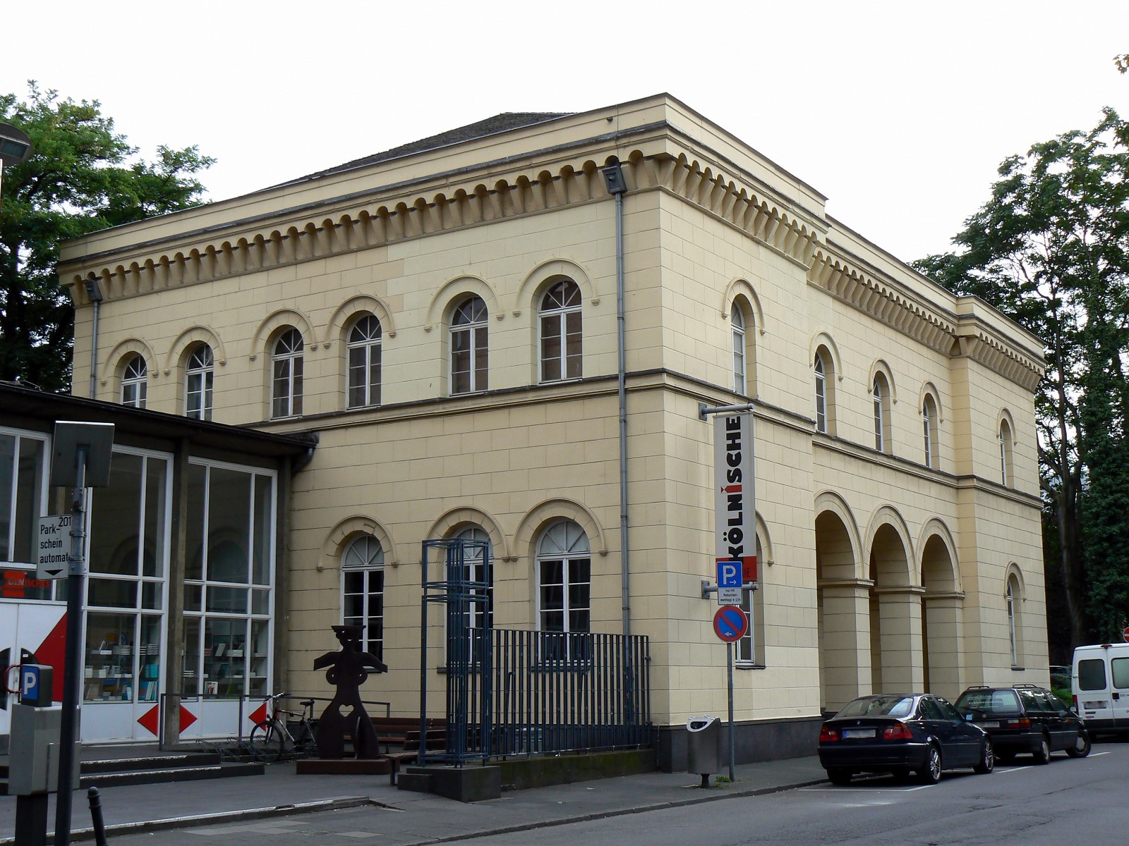 Museum Alte Wache (Kölnische Galerie) in Köln.